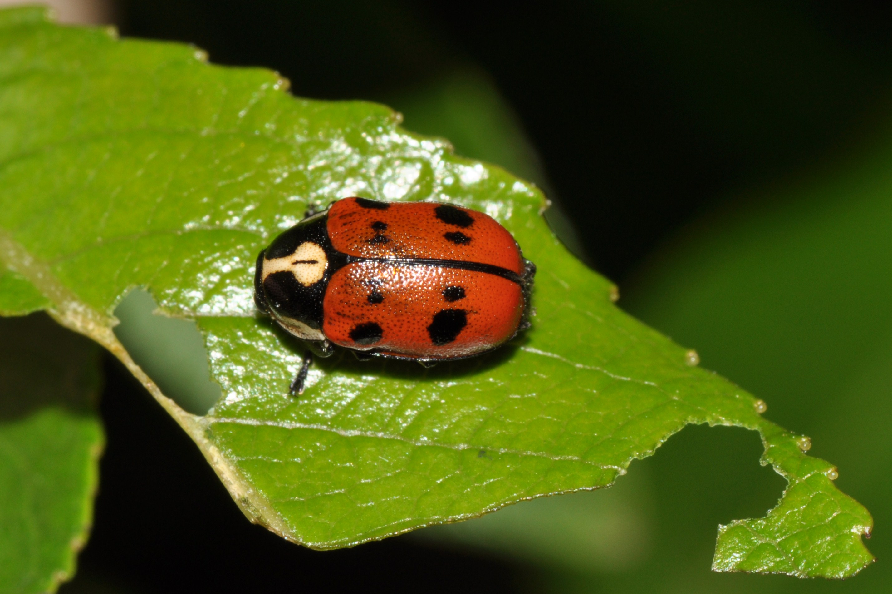 Скрытоглав